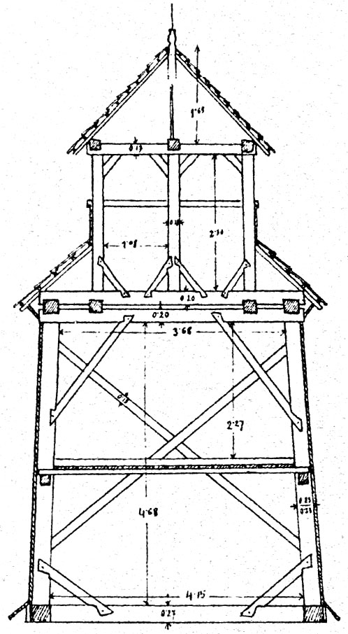 Креслення перекрою дзвіниці XIII-XIX ст. в селі Воля Якубова.